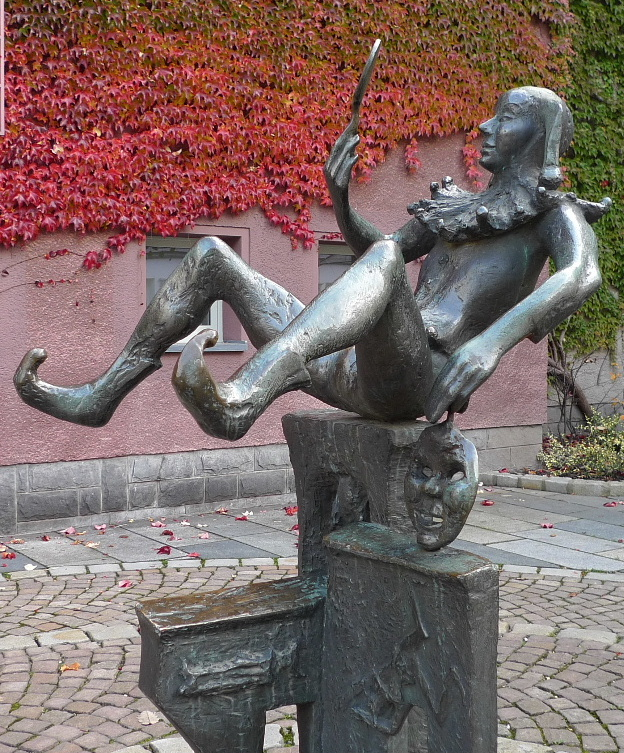 Erika Harbort: „Harlekin“ (1987) – Standort: Zwickau vor dem Puppentheater.